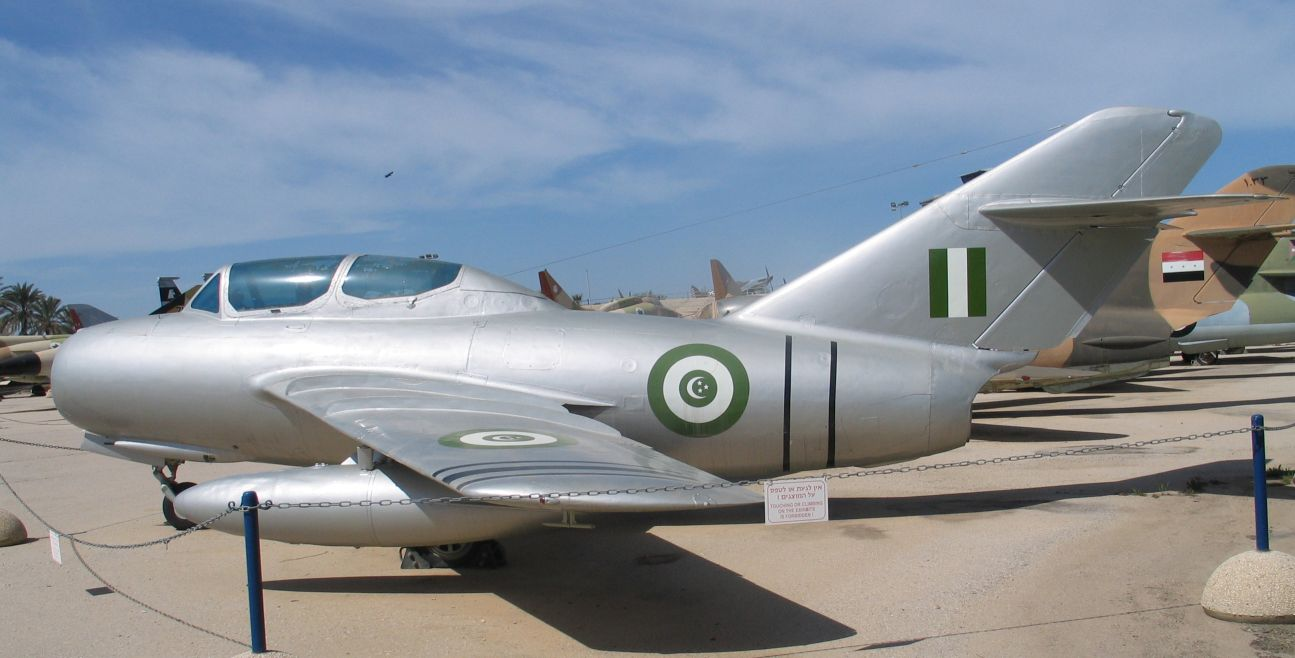 الوصف: مقاتلة ميكويان جيريفيتش ميج-15 يو تي أي عليها شعار القوات الجوية الملكية المصرية (الآن القوات الجوية المصرية) معروضة في معرض القوات الجوية الإسرائيلية (Muzeyon Heyl ha-Avir) في قاعدة حاتساريم الجوية الإسرائيلية، إسرائيل 2006. Description: MIG-15UTI on display at the Israeli Air Force Museum (Muzeyon Heyl ha-Avir) located at Hatserim Israeli Air Force Base, Israel. 2006. Source: Photo by me, User:Bukvoed.